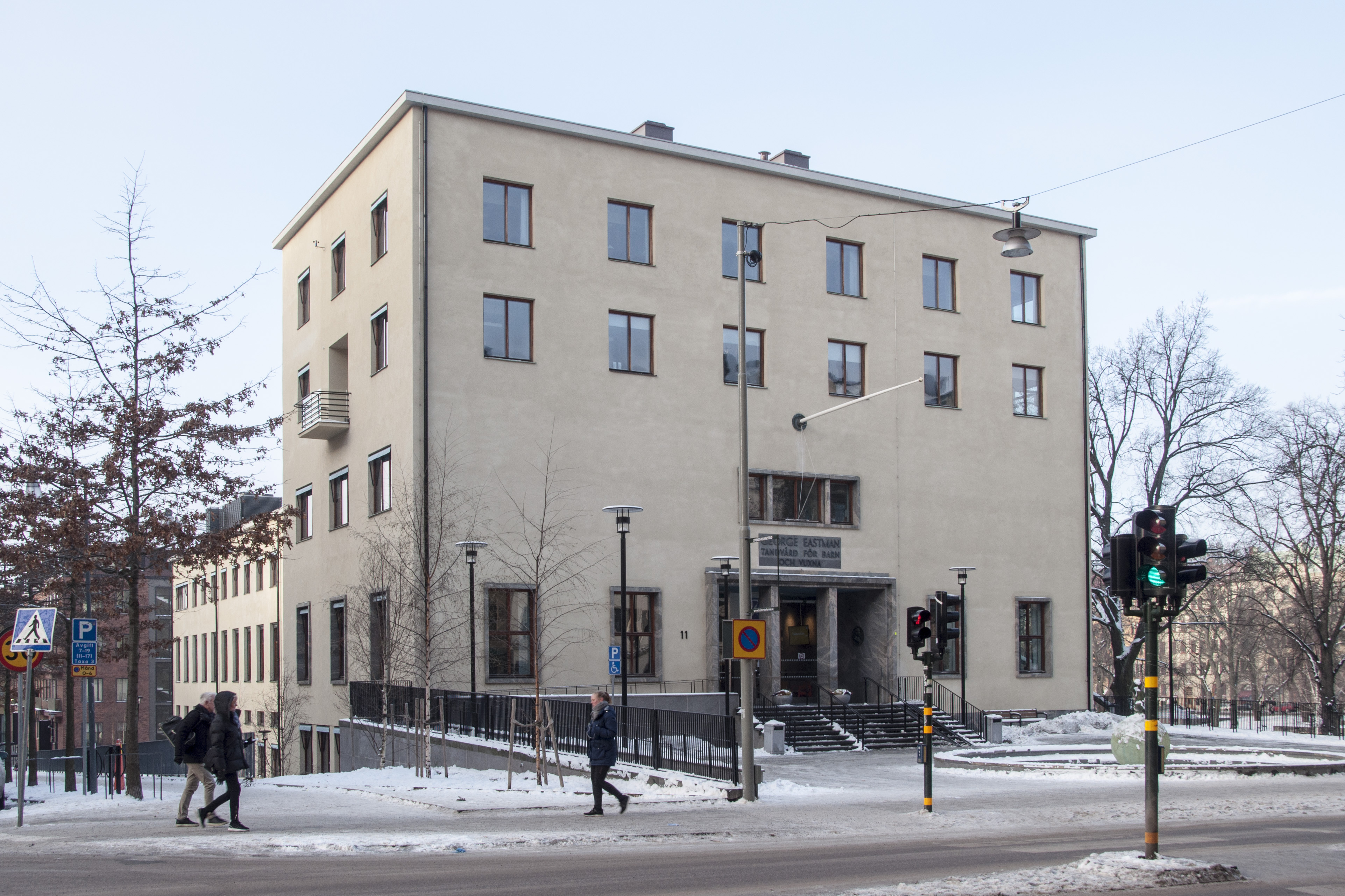 Eastmaninstitutet, BRUNNSMÄSTAREN 2, Dalagatan 11, Eastmansvägen 2- 4 Stockholm Nybyggnadsår 1932 - 1936 Direktionen över Eastmaninstitutet (Byggherre) FSK Stockholms Stads Fastighetskontor (Byggmästare) Waldemar Johansson (Arkitekt)